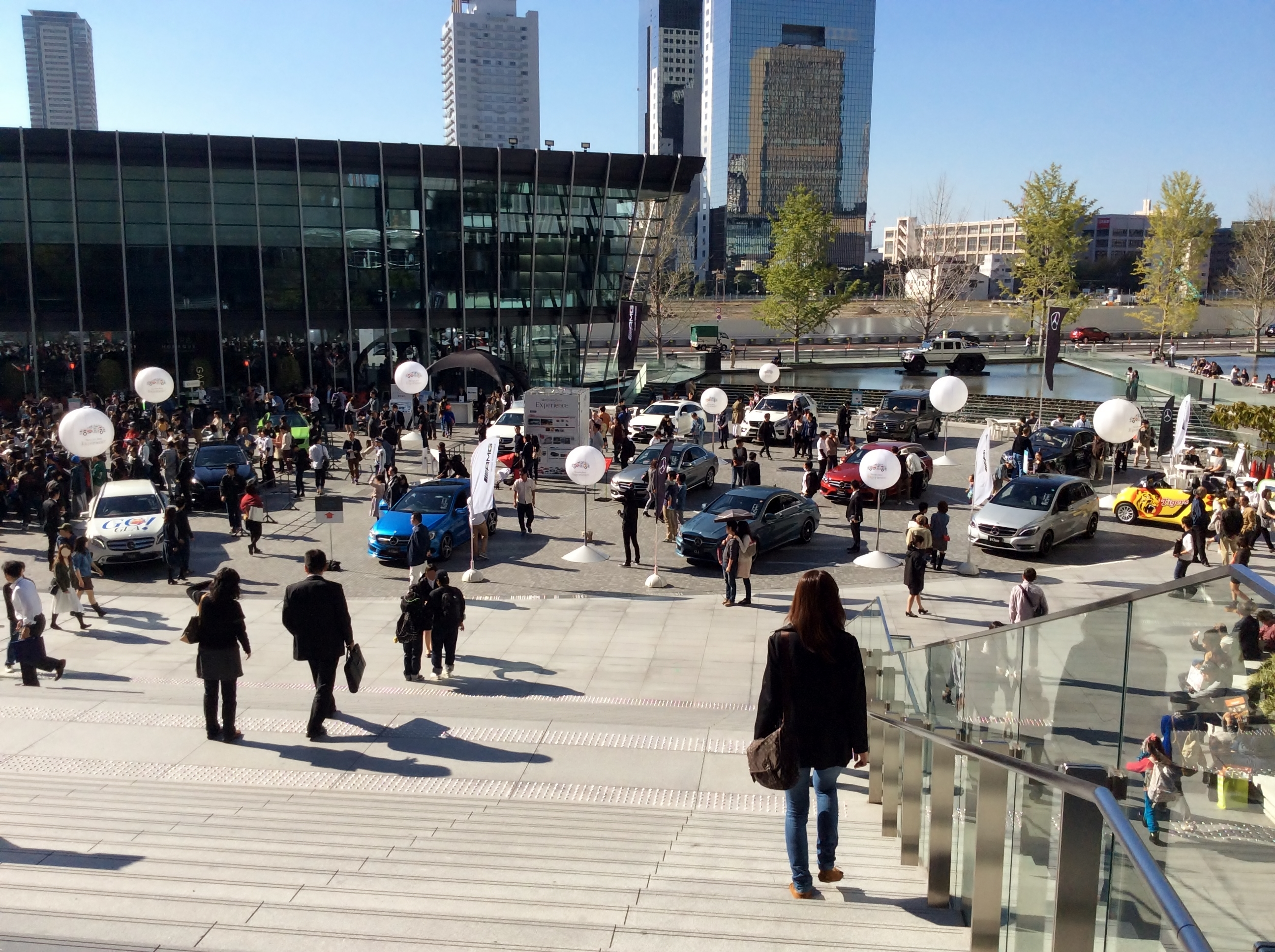 2014年10月17～19日に梅田で行われたメルセデス・ベンツエクスペリエンスの様子を撮影。